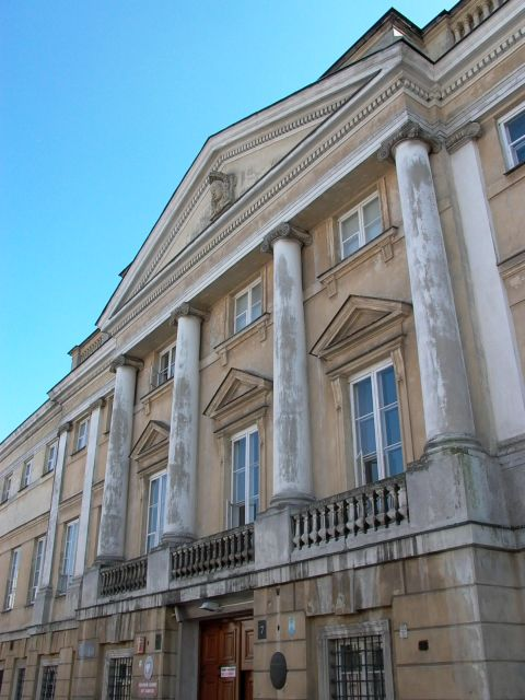 Raczyńscy Palace in Warsaw, Długa Street. 7 Author: Zbigniew Strucki